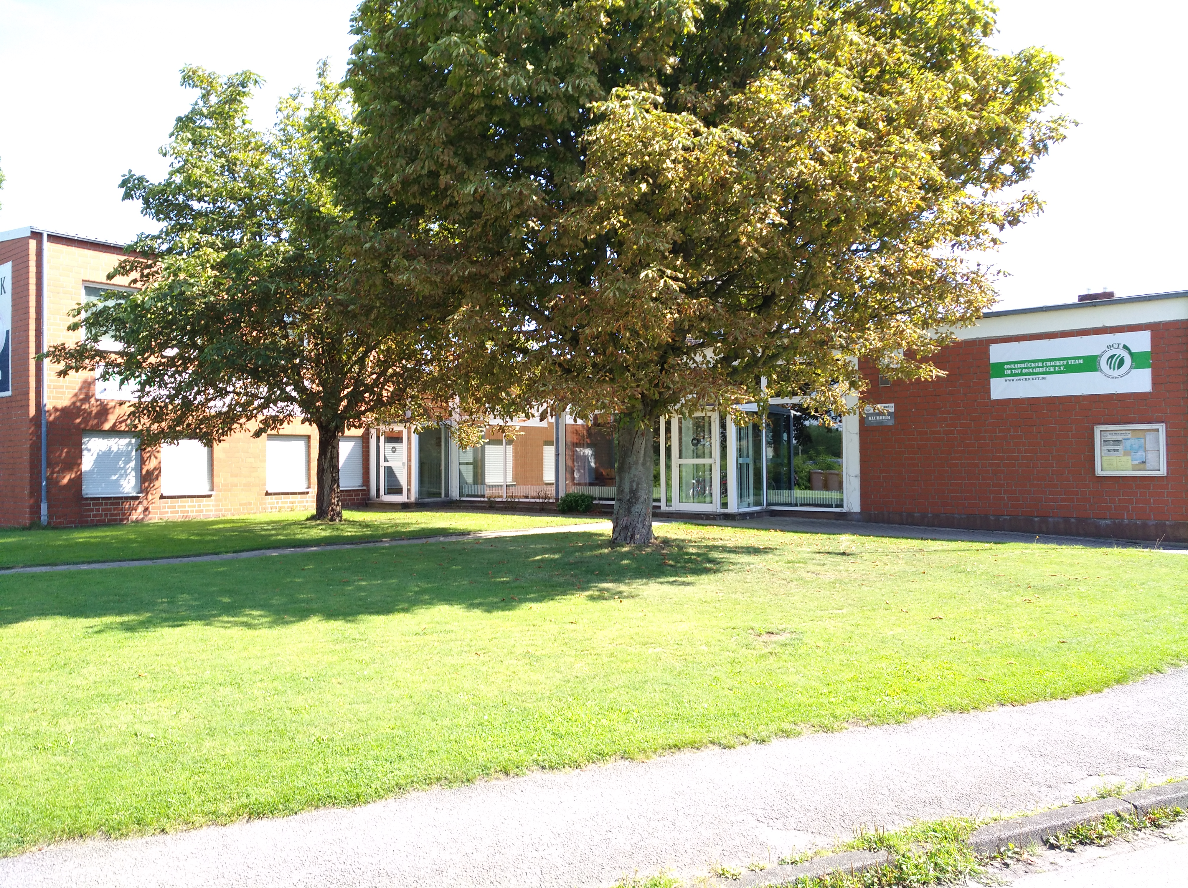 Das Klubheim des Eisenbahner Turn- und Sportverein Osnabrück von 1926 e.V. (TSV).